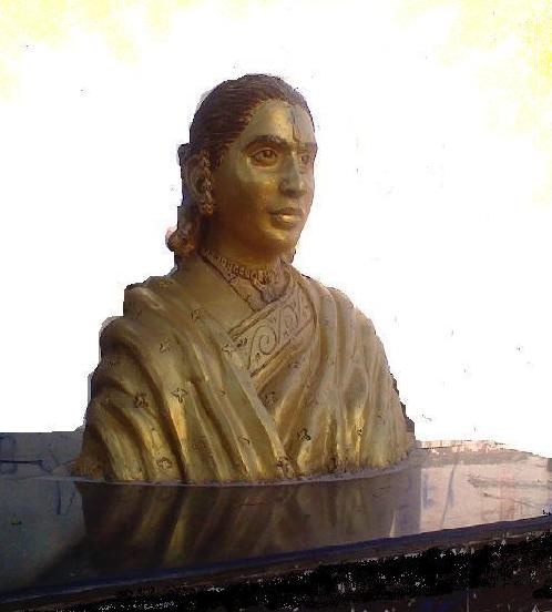 మహారాణి ఆదిలక్ష్మిదేవమ్మ